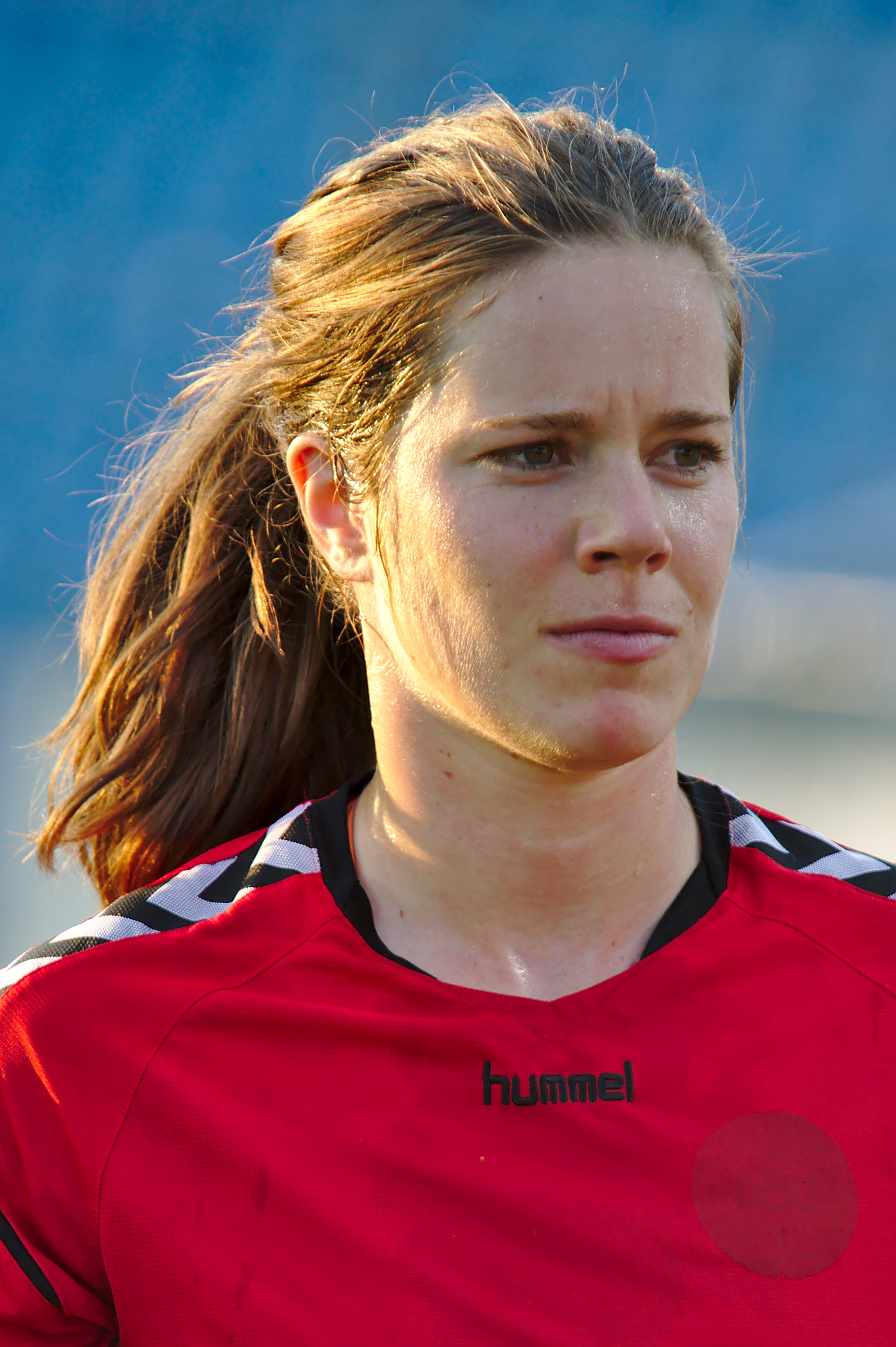 Freundschaftsspiel ÖFB Damen Nationalmannschaft gegen Dänemark am 6. Juli 2017. Bild zeigt: Sofie Junge Pedersen